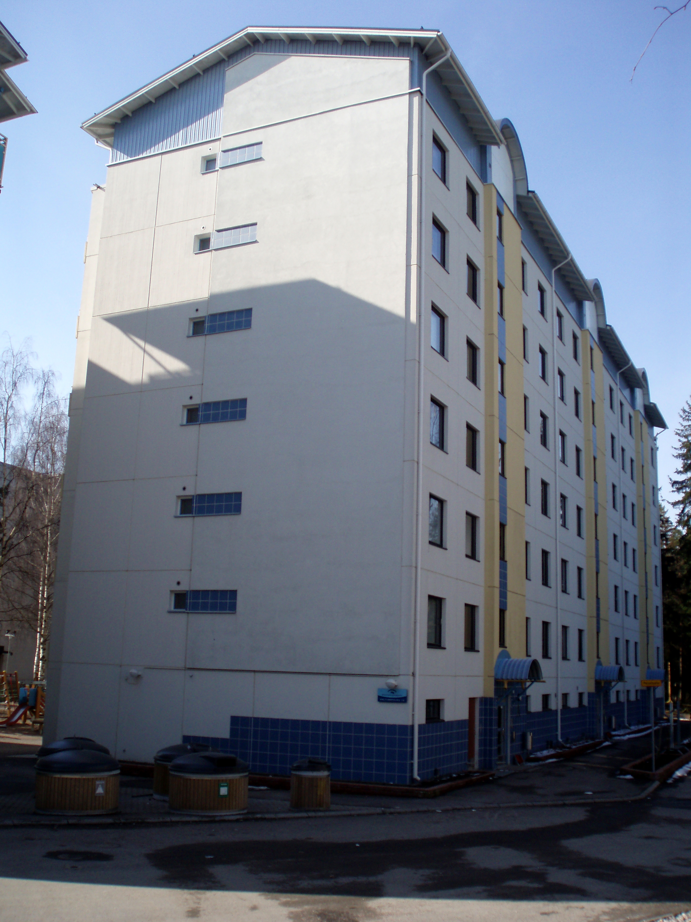 Haltiapolku 14, Jamppa, Järvenpää